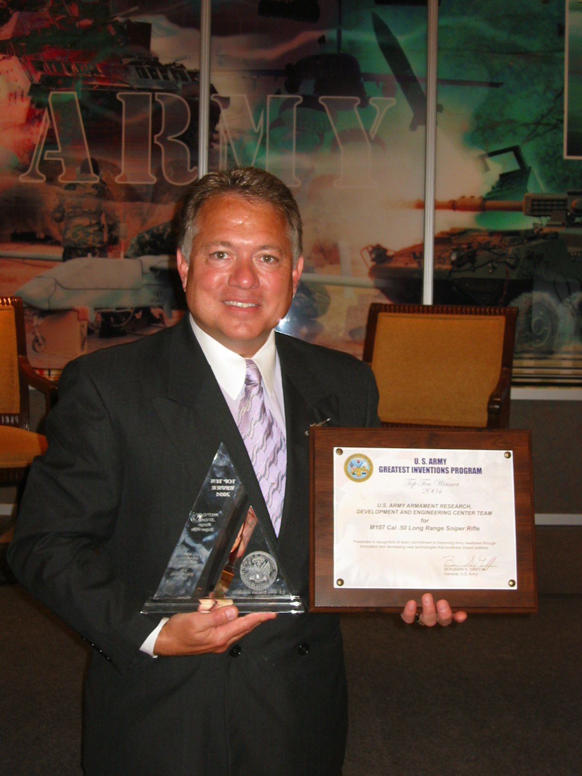 Ronnie Barrett Top 10 Invention Award